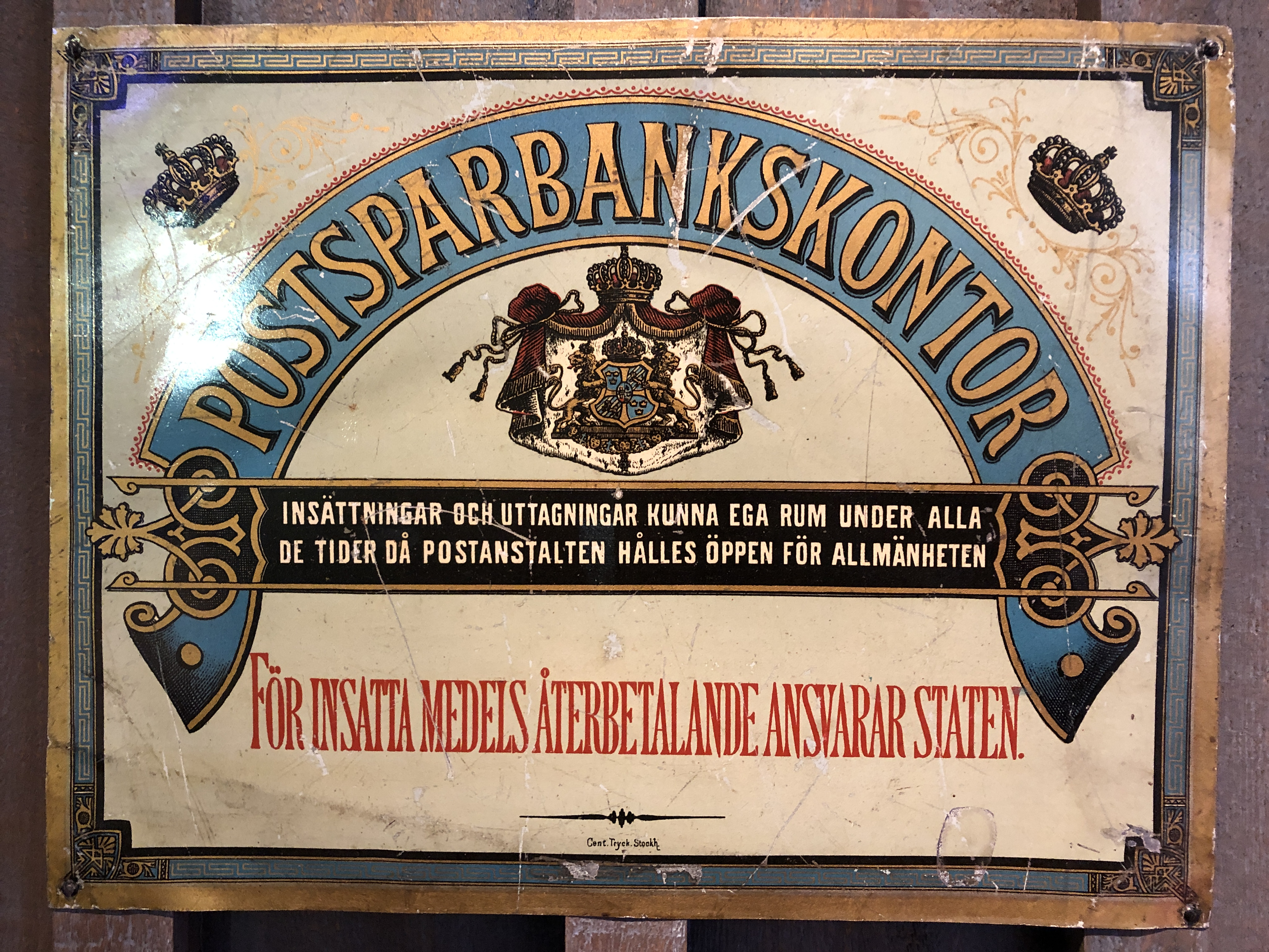 Postsparbankskontor- skylt Postmuseum